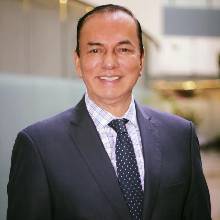 José Manuel del Río Virgen, Secretario Técnico de la Junta de Coordinación Política del Senado de la República